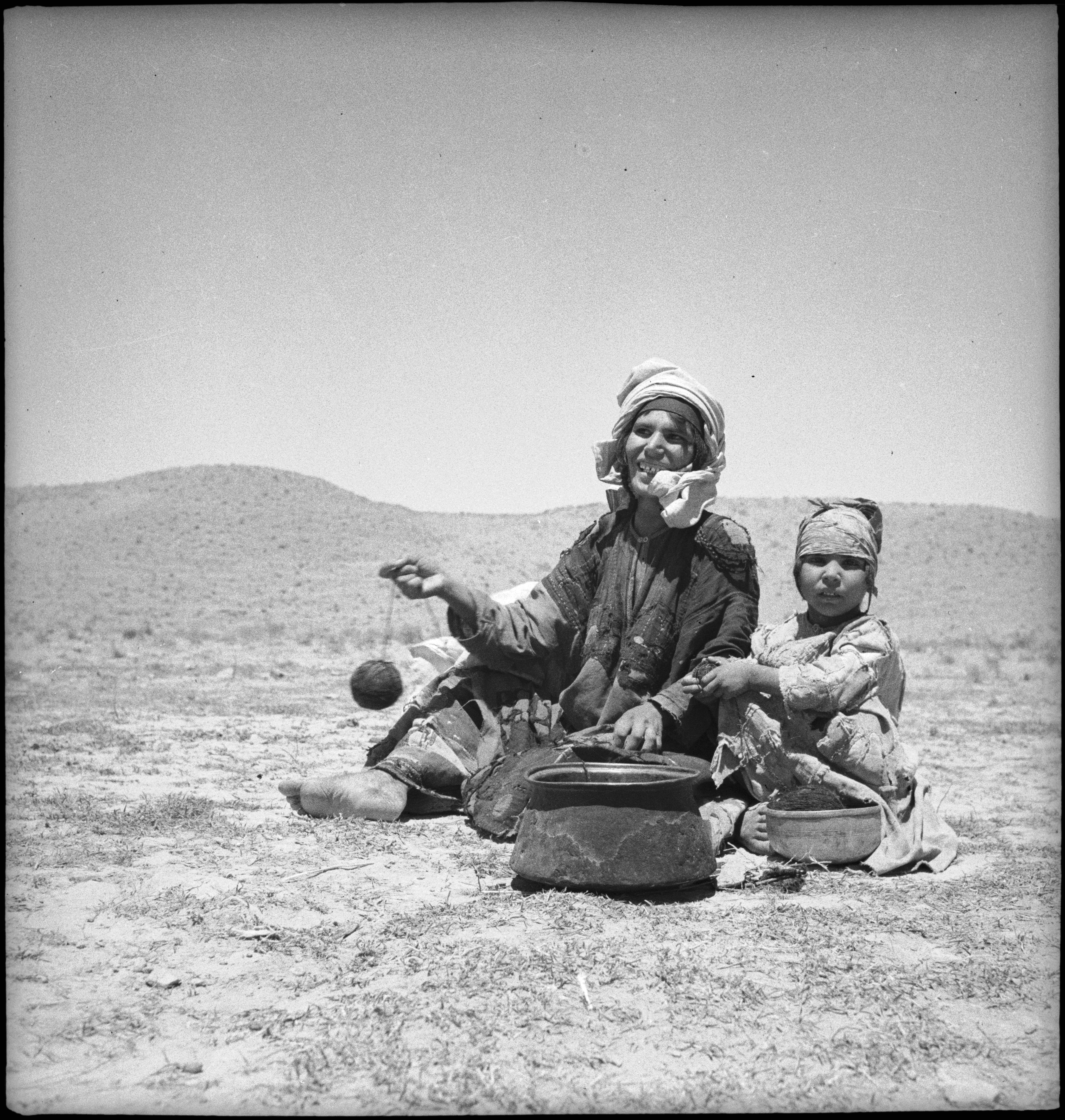 Afghanistan, vor Chahrshambe (Khvajeh Chahar Shanbeh): Menschen; Sitzende Frau mit Kind